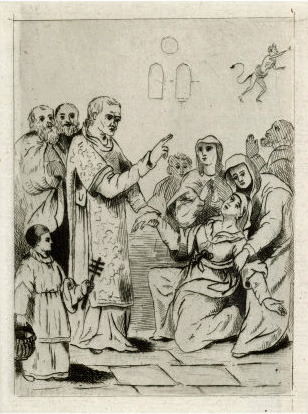 Exorcisme de Magdelaine Bavent